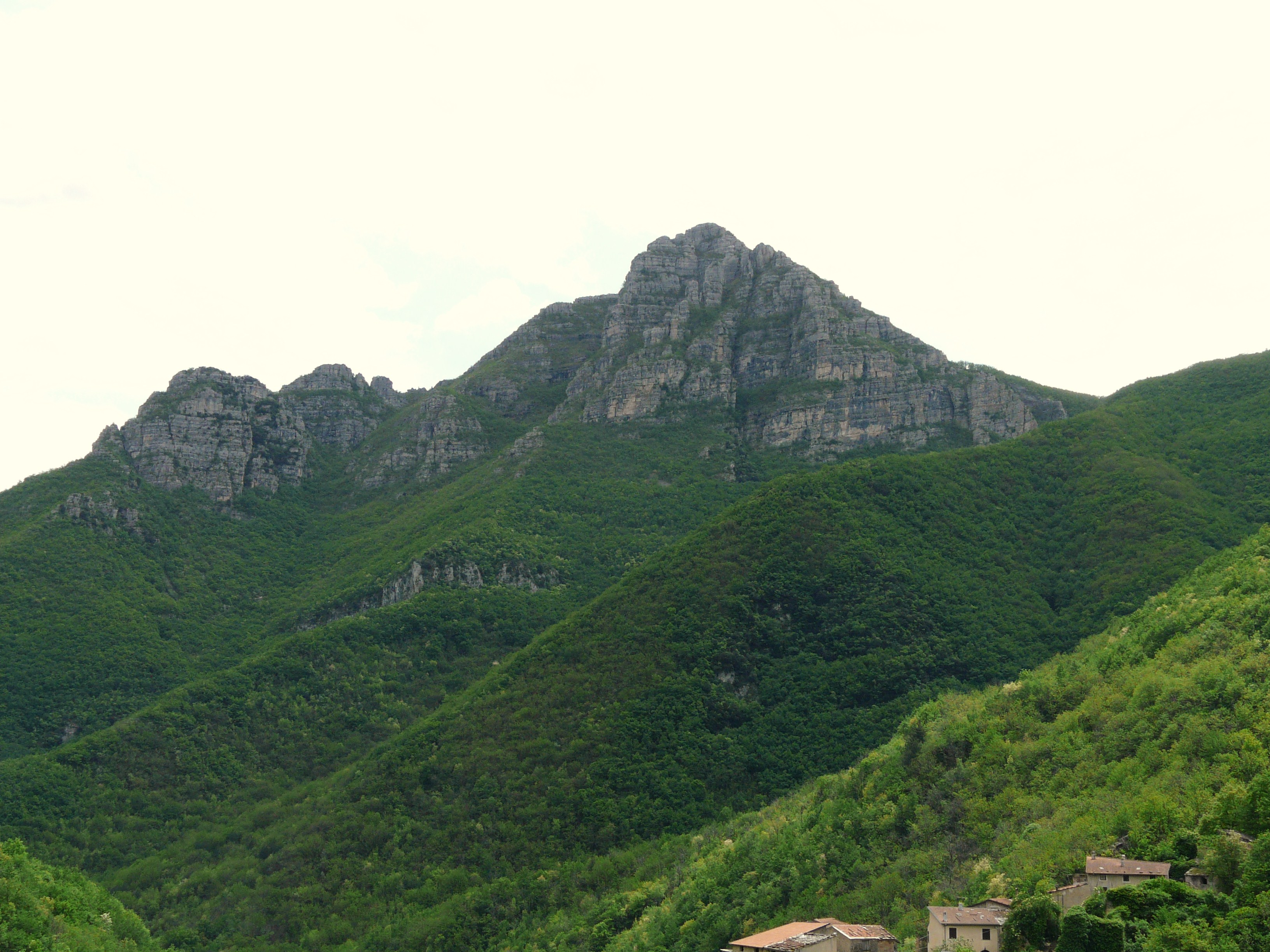 Valle Pennavaira presso Nasino, Liguria, Italia